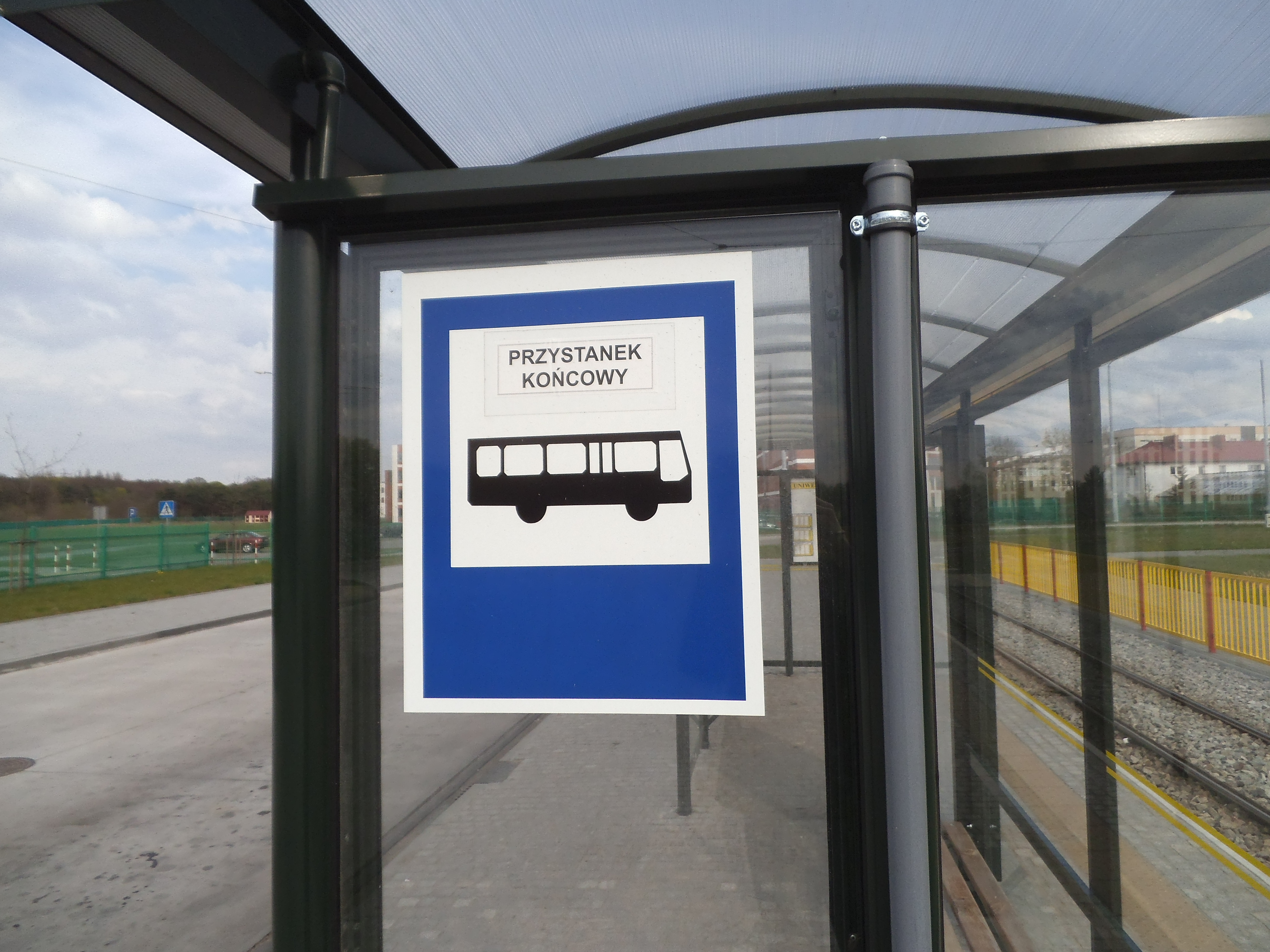 Przystanek autobusowy końcowy w Toruniu